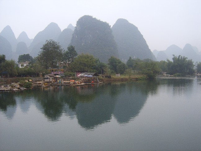 Yangshuo